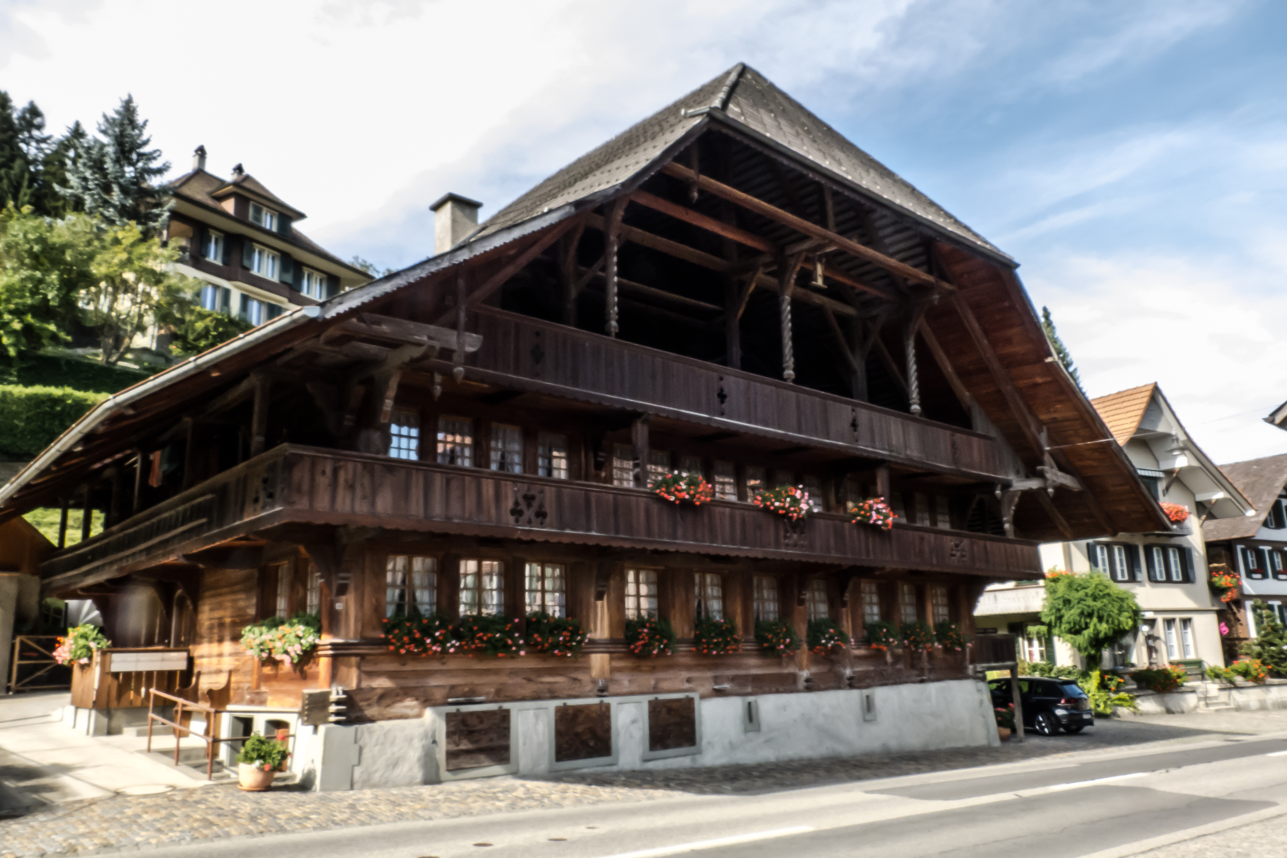 Moserhaus Signau, ehem. Färberei